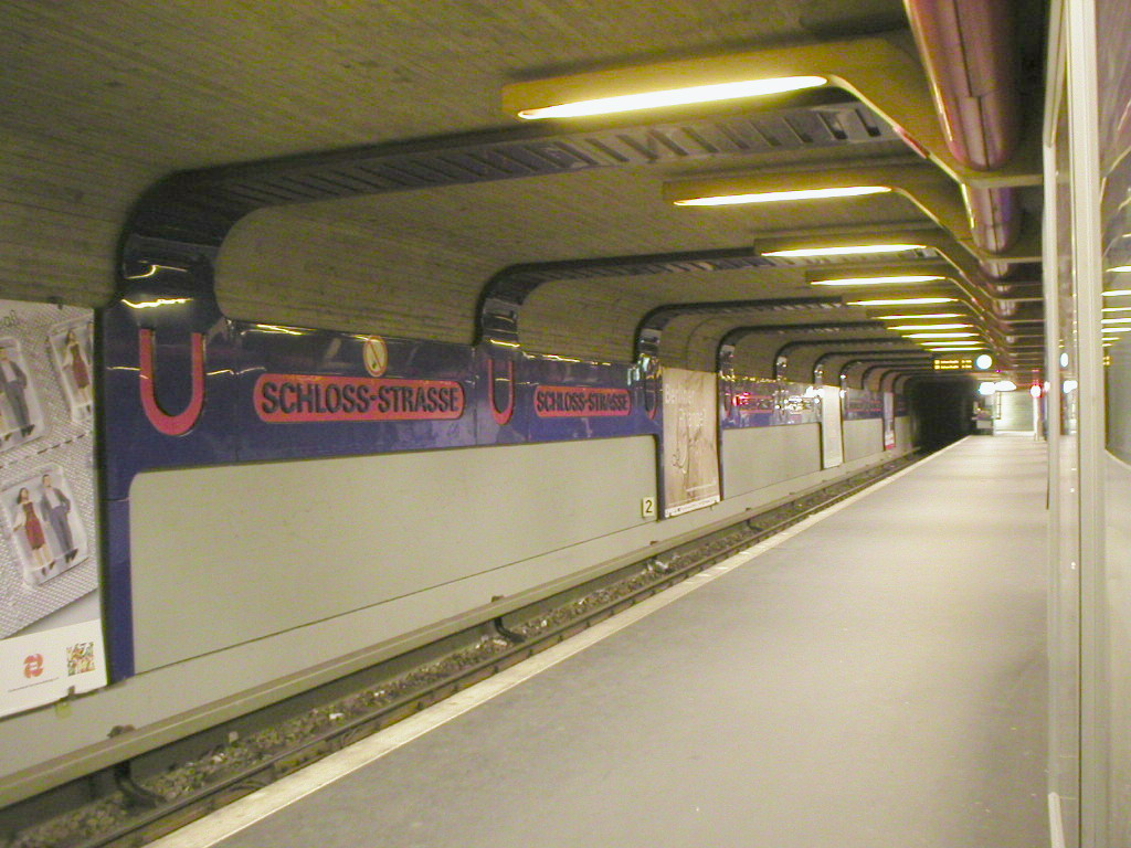 U-Bahn Berlin Schlossstraße